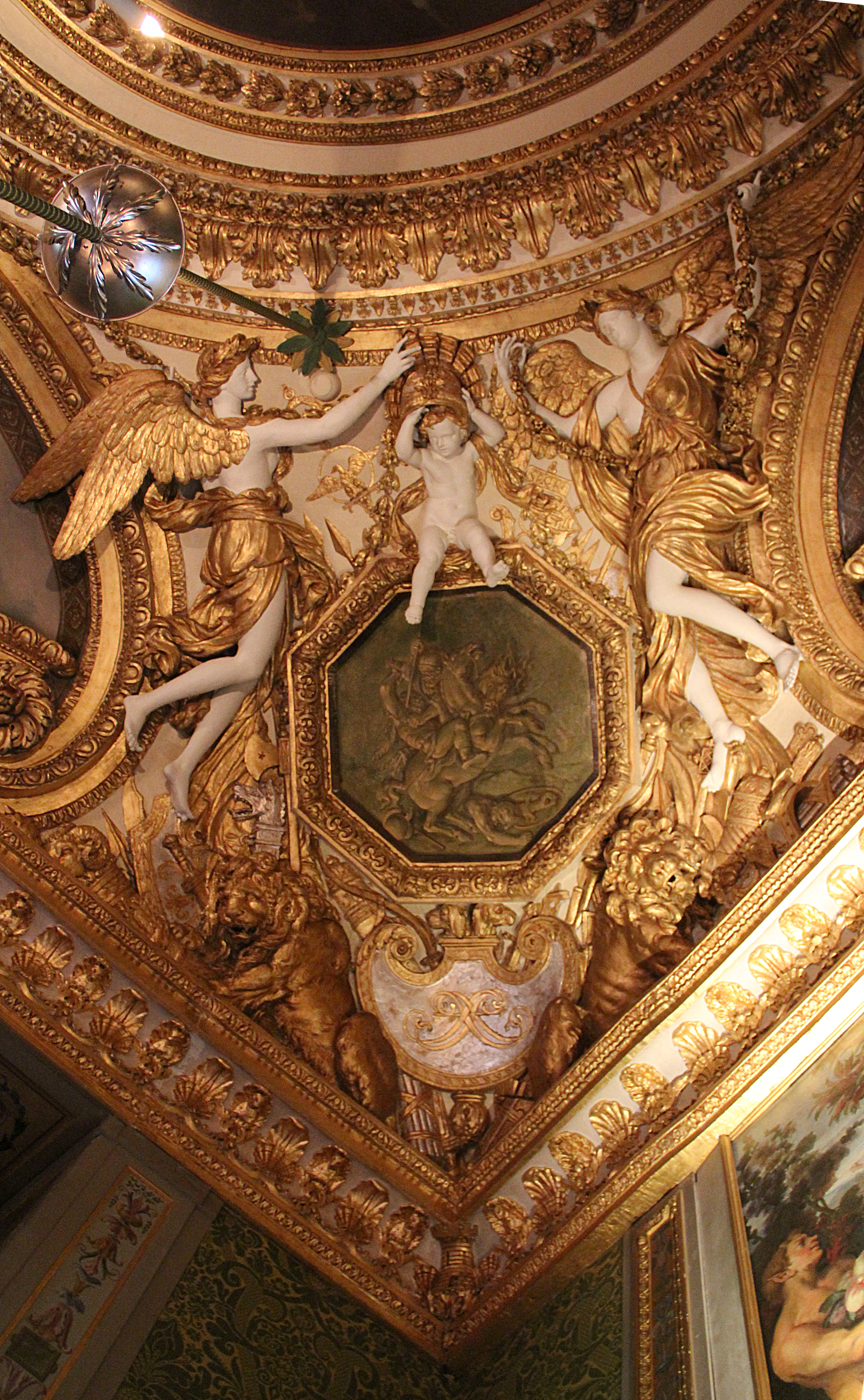 Stucs et grisaille attribués aux sculpteurs Nicolas Legendre et François Girardon et au peintre-doreur Paul Gougeon dit La Baronnière, réalisés entre 1660 et 1661 pour orner le plafond de la chambre du Roi du château de Vaux-le-Vicomte - Maincy (Seine-et-Marne, France).